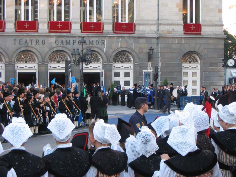 Descripción